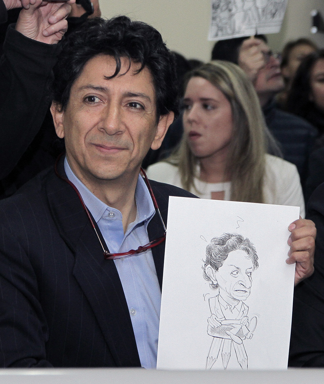 Quito, 9 feb (ANDES).- El caricaturista Xavier Bonilla "Bonil" atiende a la audiencia en la supercom. Fotografías: Carlos Rodríguez/ANDES